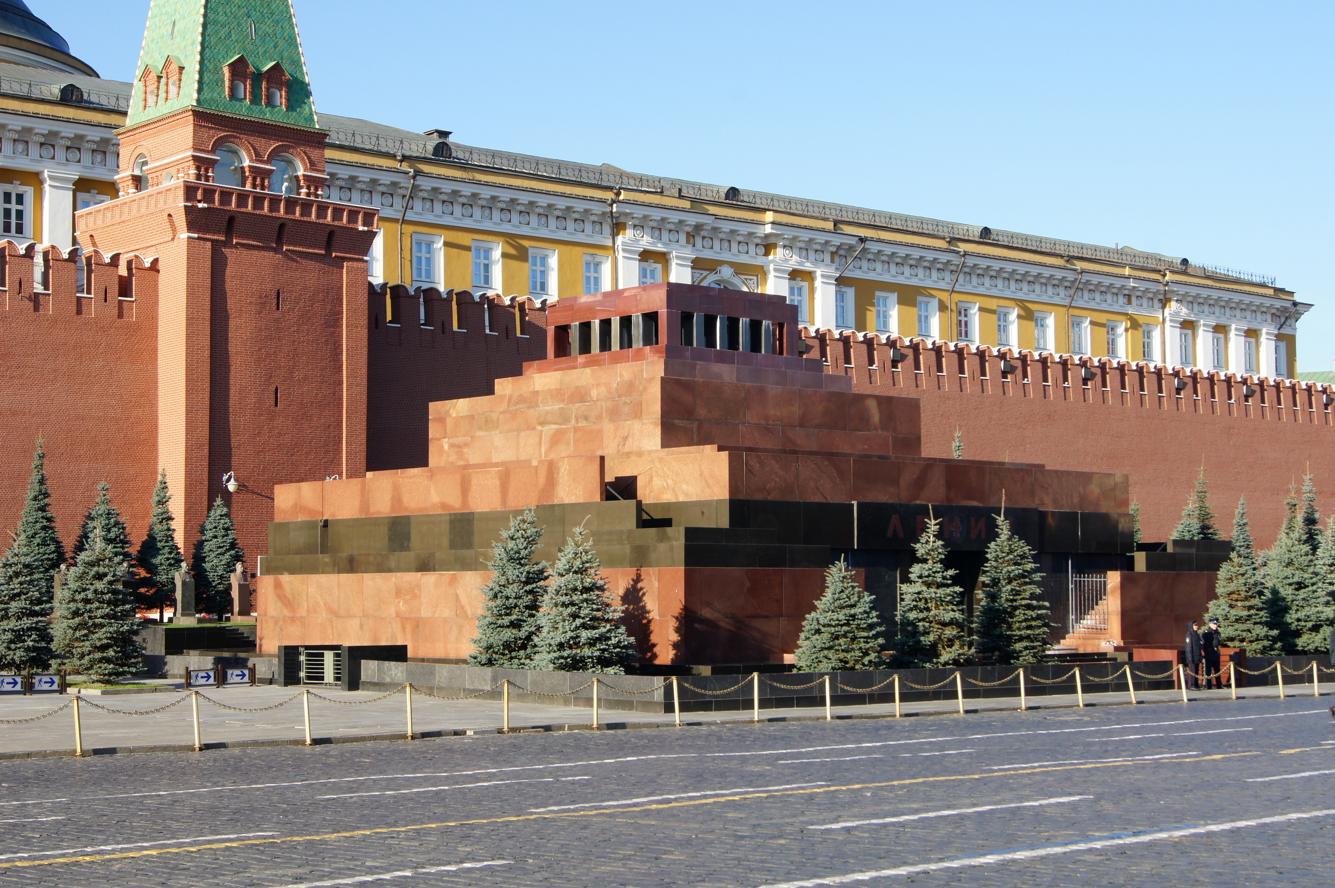 Мавзолей Ленина Владимира Ильича: Тверской, Центральный округ, Москва